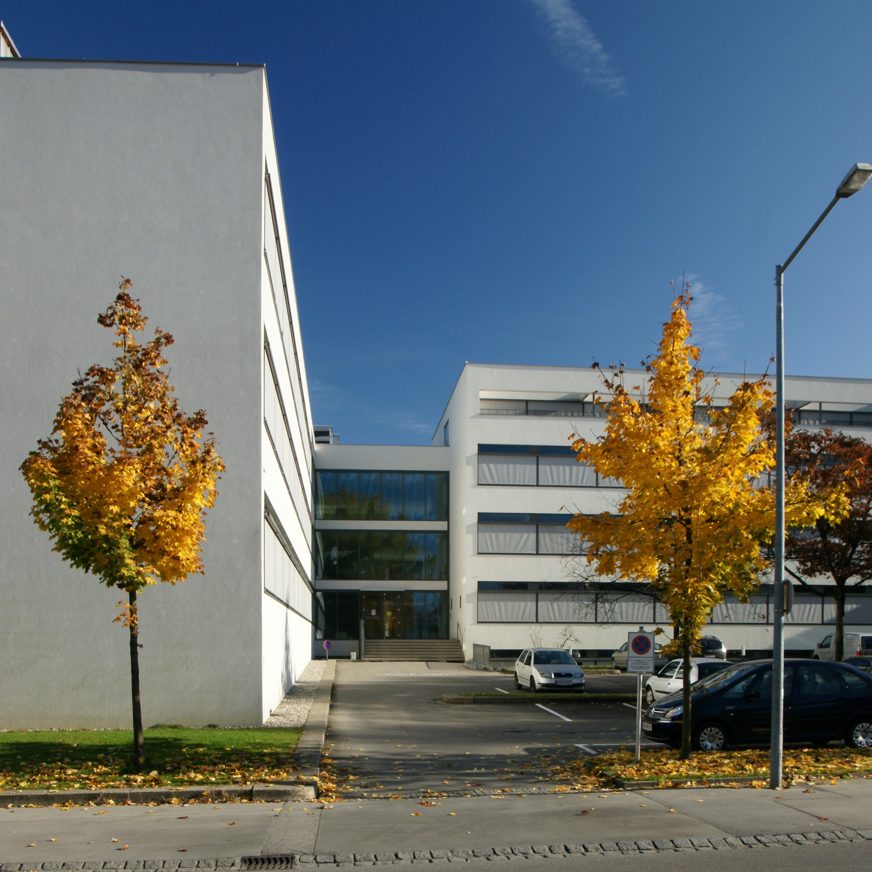 Umbau und Erweiterung des BRG und BORG Dornbirn Schoren (Bundes-Oberstufen-Realgymnasiums) im Stadtteil Schoren in Dornbirn im Jahre 2003 durch die Architekten (Dietrich/Untertrifaller.